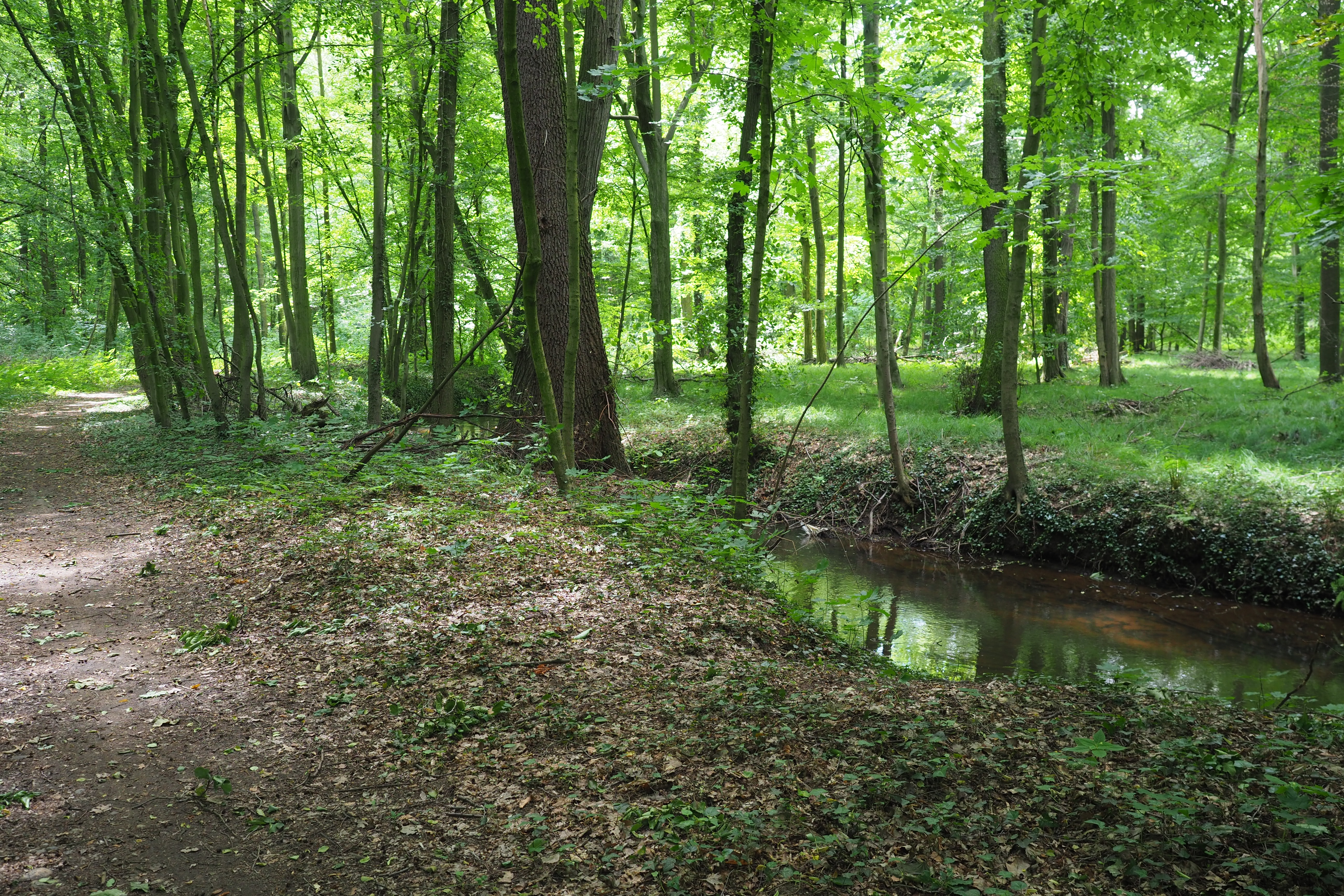 Naturschutzgebiet Röderauwald Zabeltitz